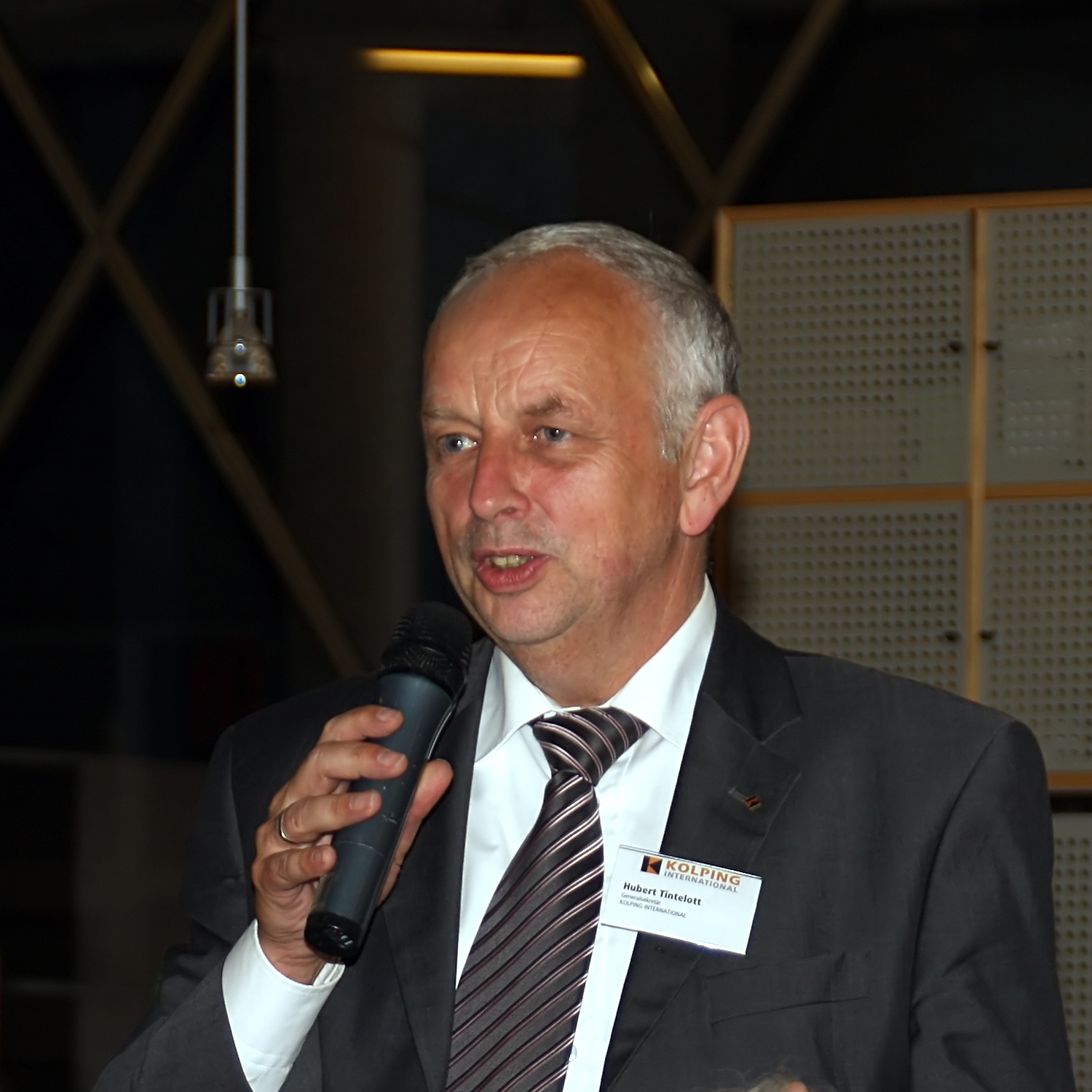 Hubert Tintelott, Generalsekretär des Internationalen Kolpingwerkes, bei einem Vortrag „Adolf Kolping – Ein Vorbild für die heutige Zeit. 160 Jahre Kath. Gesellenverein.“ im Domforum Köln.